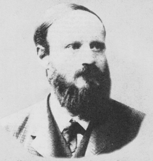 Carl Martin Rosenberg (1843-1915)